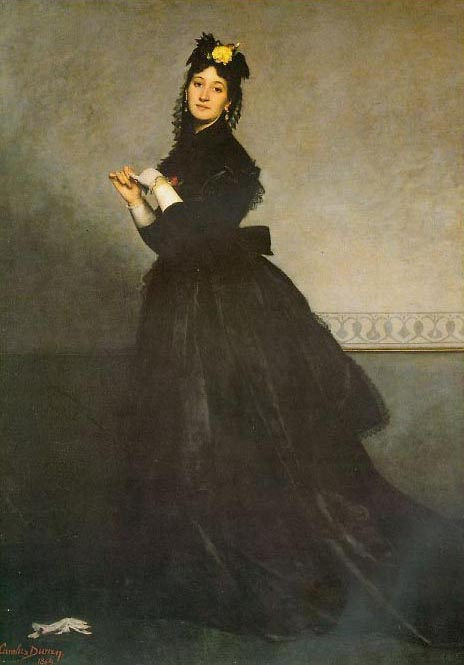 Portrait de Mme Carolus-Duran, née Pauline Croizette.